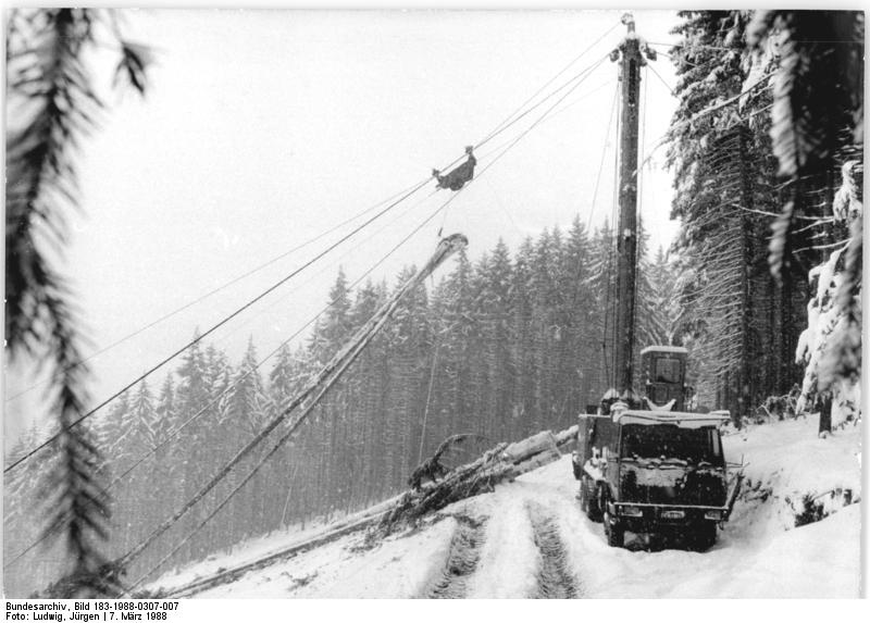 Gotha, Seilzug zum Holzrücken ADN-ZB Ludwig-7.3.1988 Bez. Erfurt: Wettbewerb- Hoher Schnee erschwert derzeit die komplizierten Arbeiten der Werktätigen des Staatlichen Forstwirtschaftsbetriebes Gotha an den Steilhängen des Thüringer Waldes. In diesem Planjahr sollen rund 152.000 Kubikmeter Rohholz bereitgestellt und umfangreiche Pflegemaßnahmen durchgeführt werden. Mit dem Rückeseilkran werden die Baumstämme den Hang hinaufbefördert.